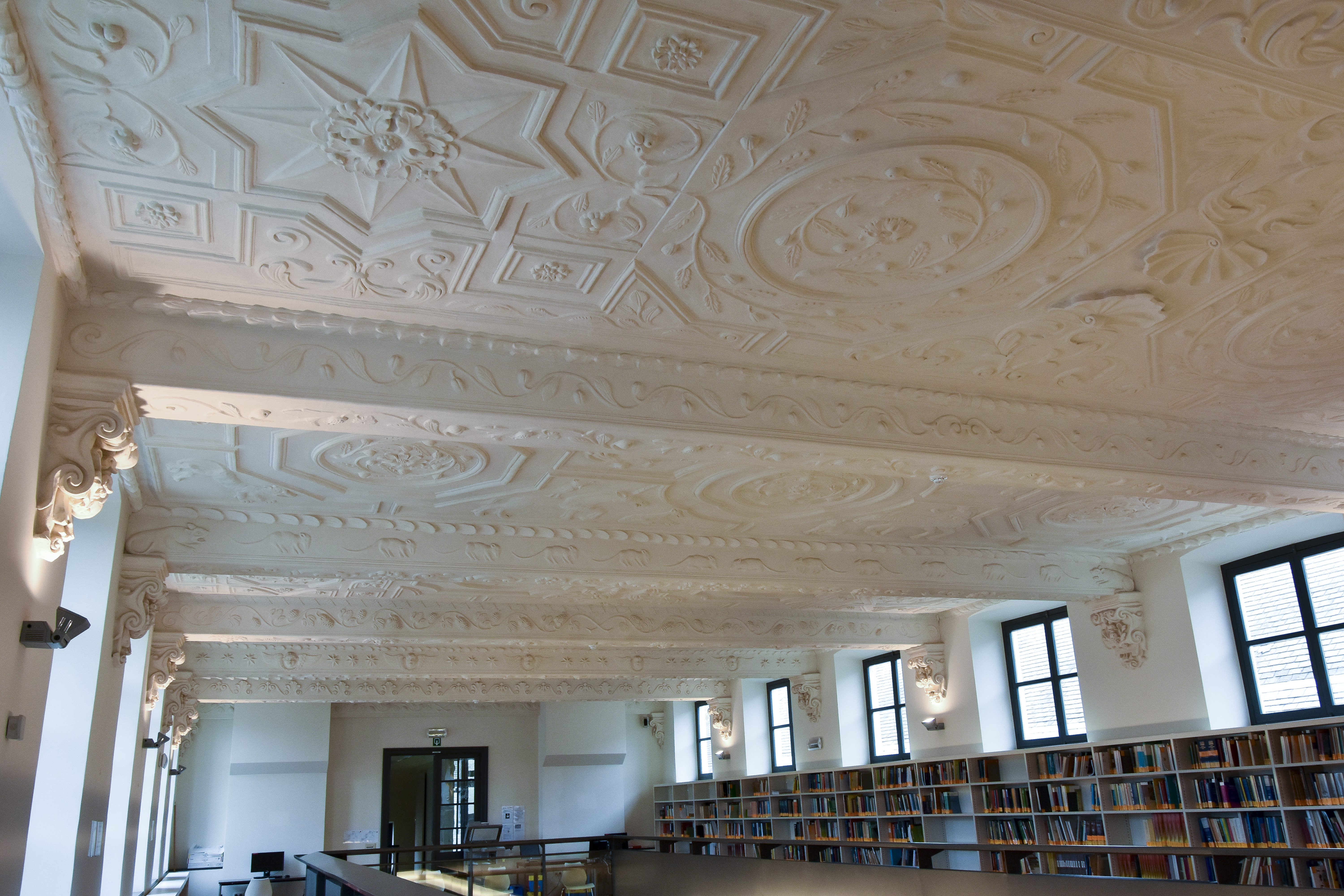 Stucplafond van Jan Hansche (17e eeuw) in de universtiteitsbibliotheek van de faculteit rechtsgeleerdheid in de Emile Braunschool te Gent, België